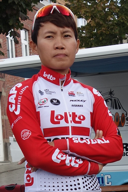 Finish van de laatste etappe op de Vesten in Geraardsbergen van de Lotto Belgium Tour 2019